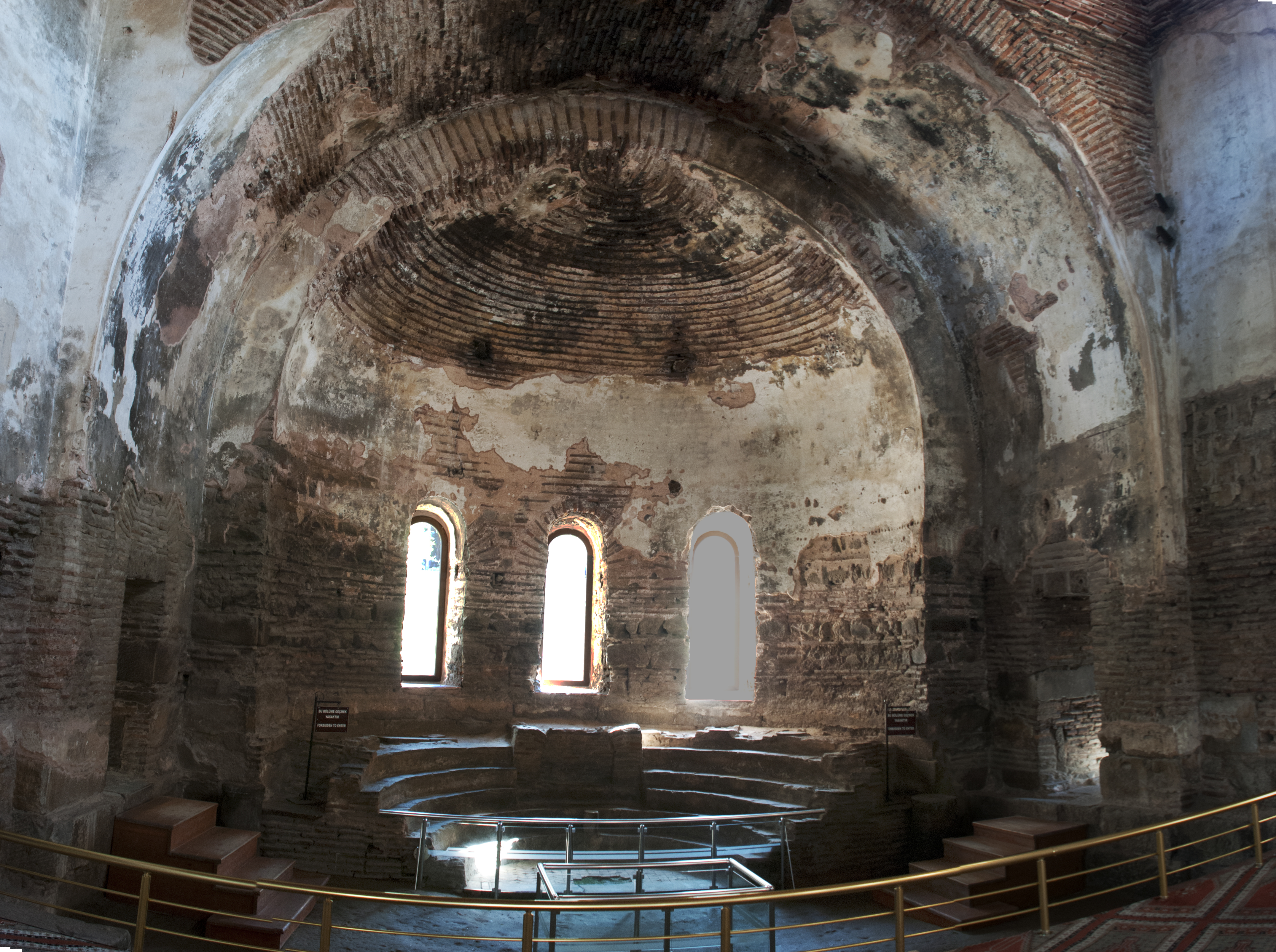 İznik Ayasofya Camii